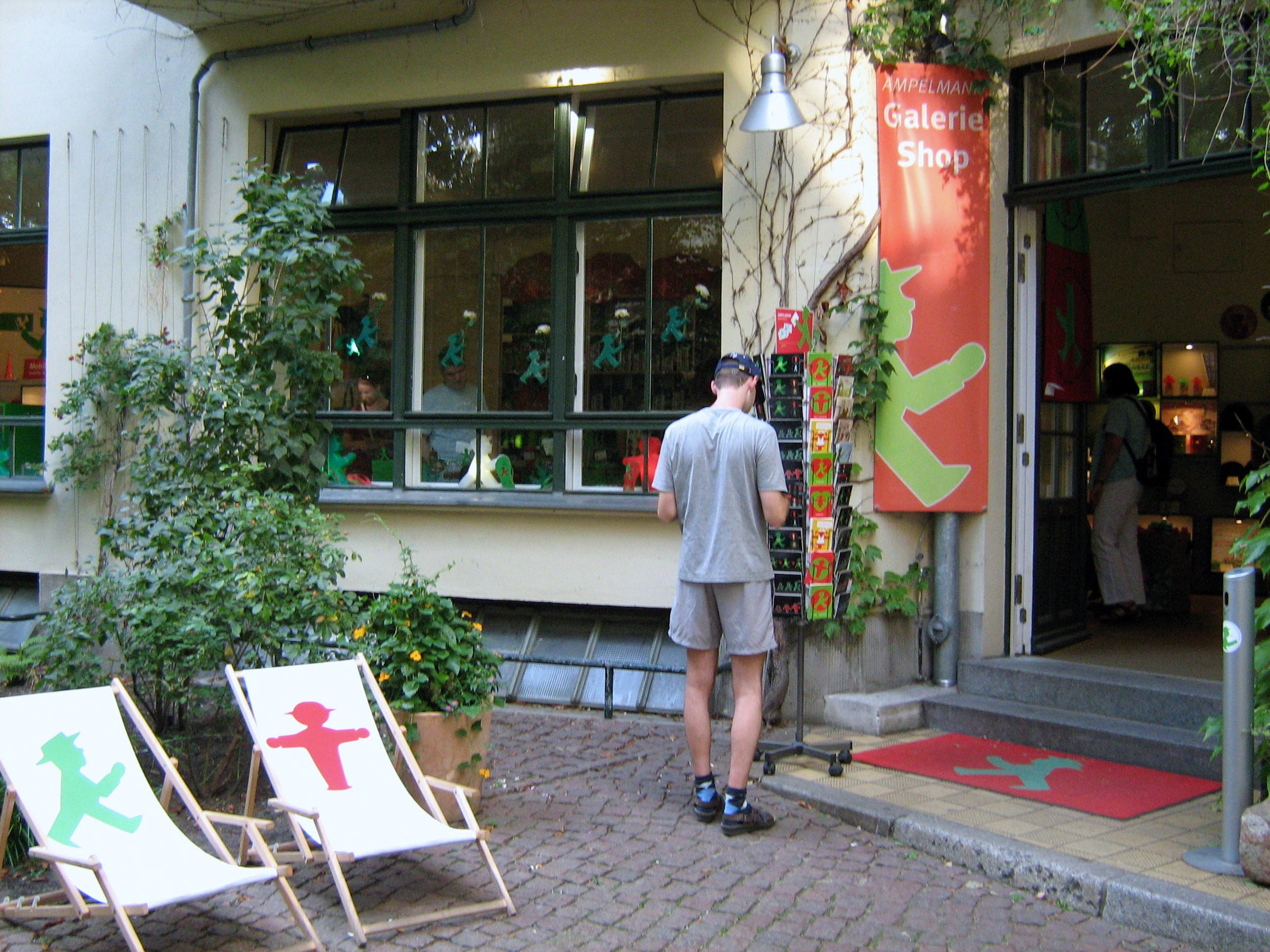 Ampelmännchen-Geschäft im Hackeschen Hof in Berlin 2009